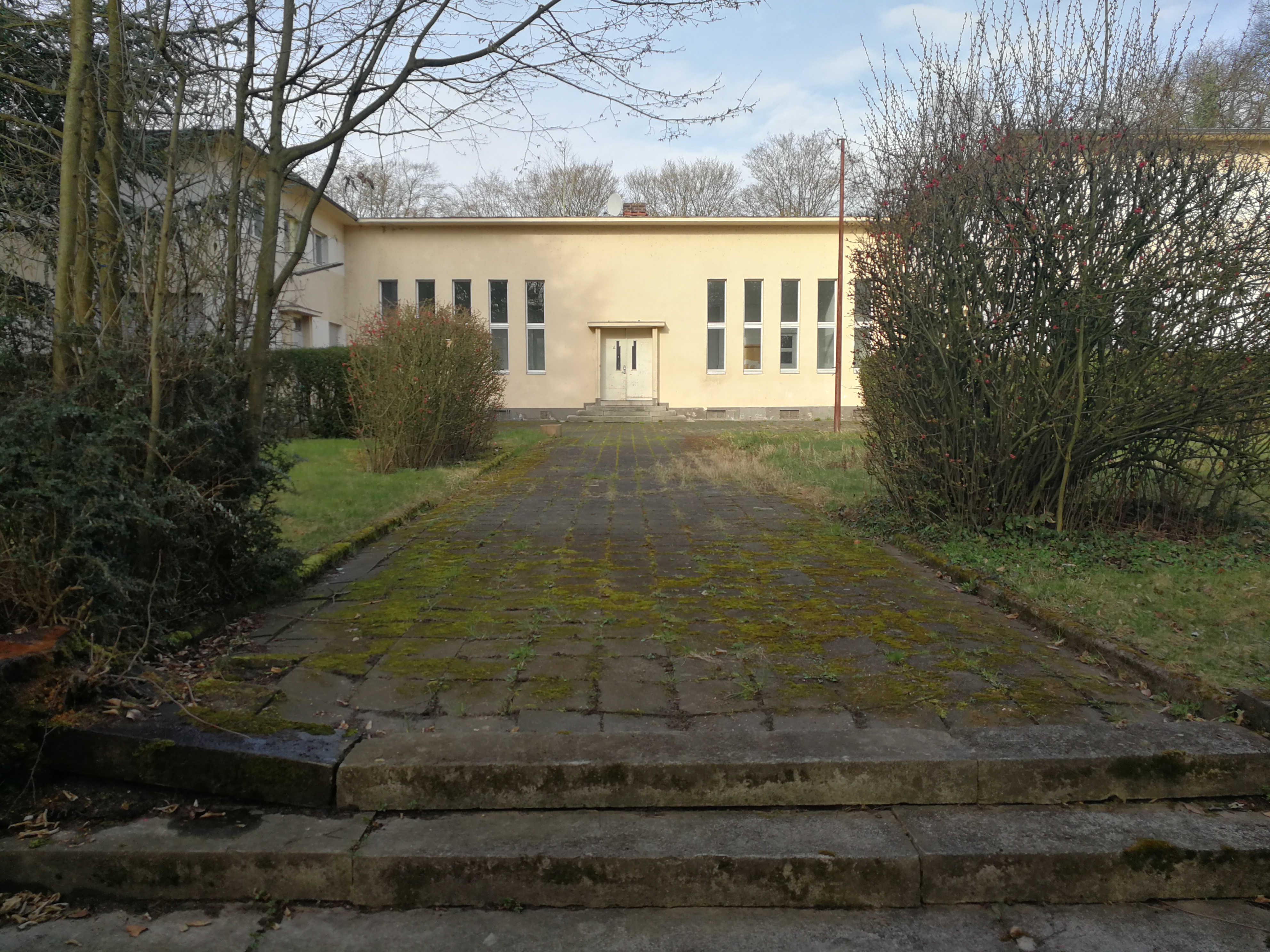 Ehemaliges Funkhaus der WERAG (Vorläufergesellschaft des WDR), Köln-Raderthal Hitzelerstraße 125, Englische Siedlung This is a photograph of an architectural monument.